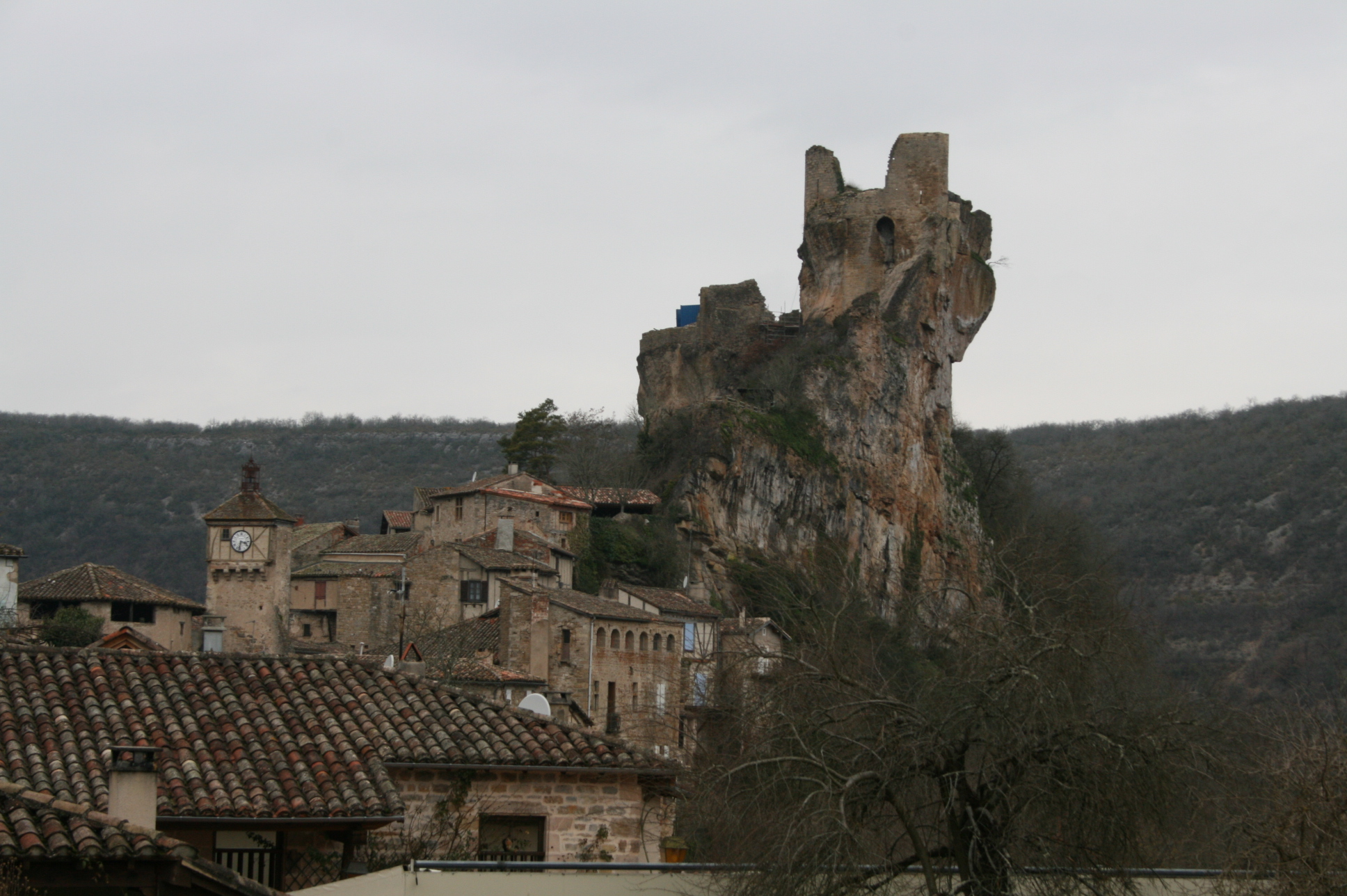 Poble d'occitània (França)